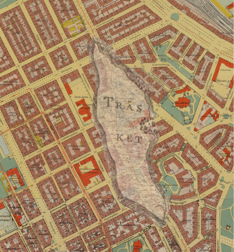 1805 och 1940 års stadskartor för området kring Träsket